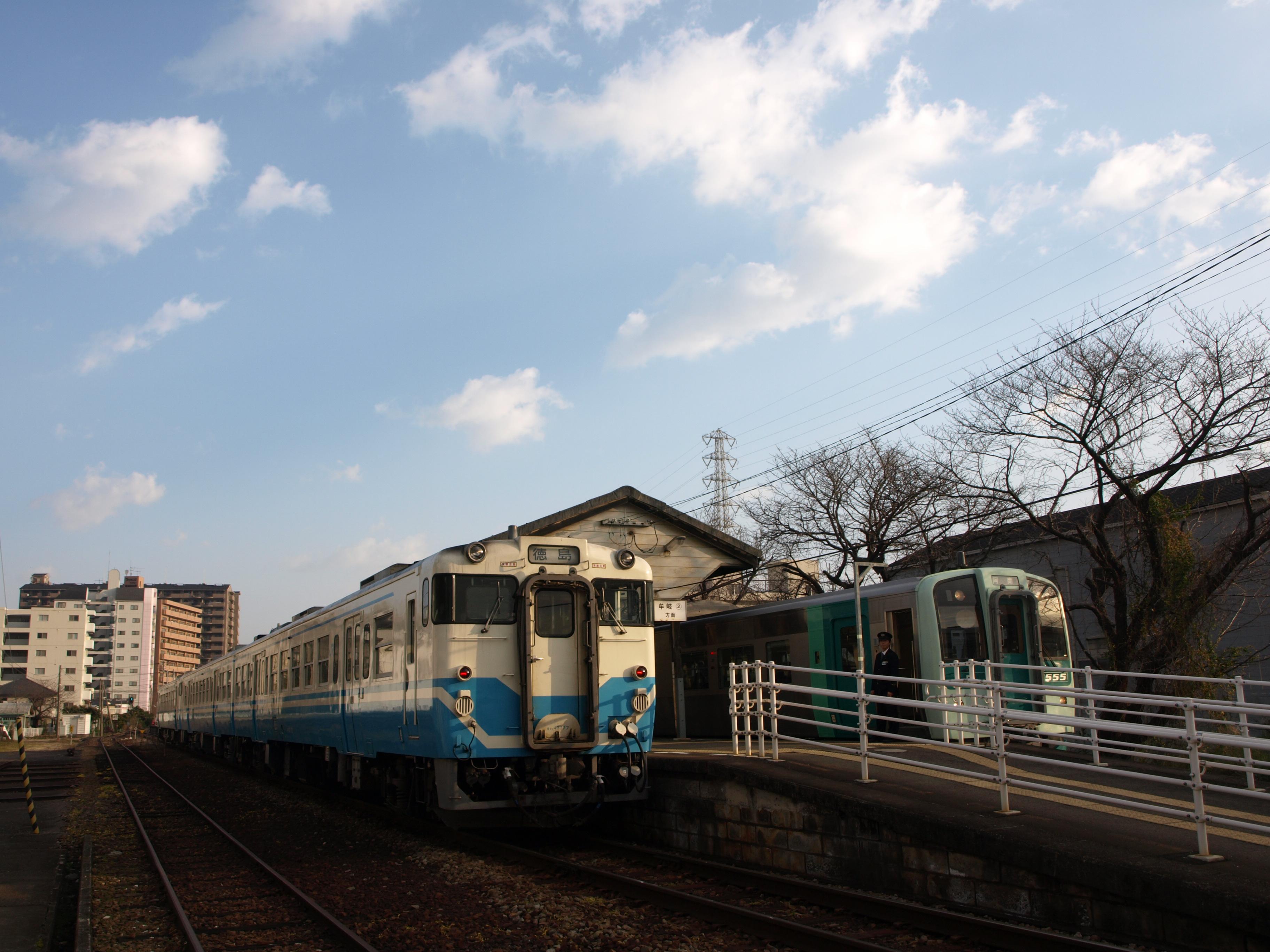 プラットフォームのスロープ部に柵が取り付けられてからのものです。